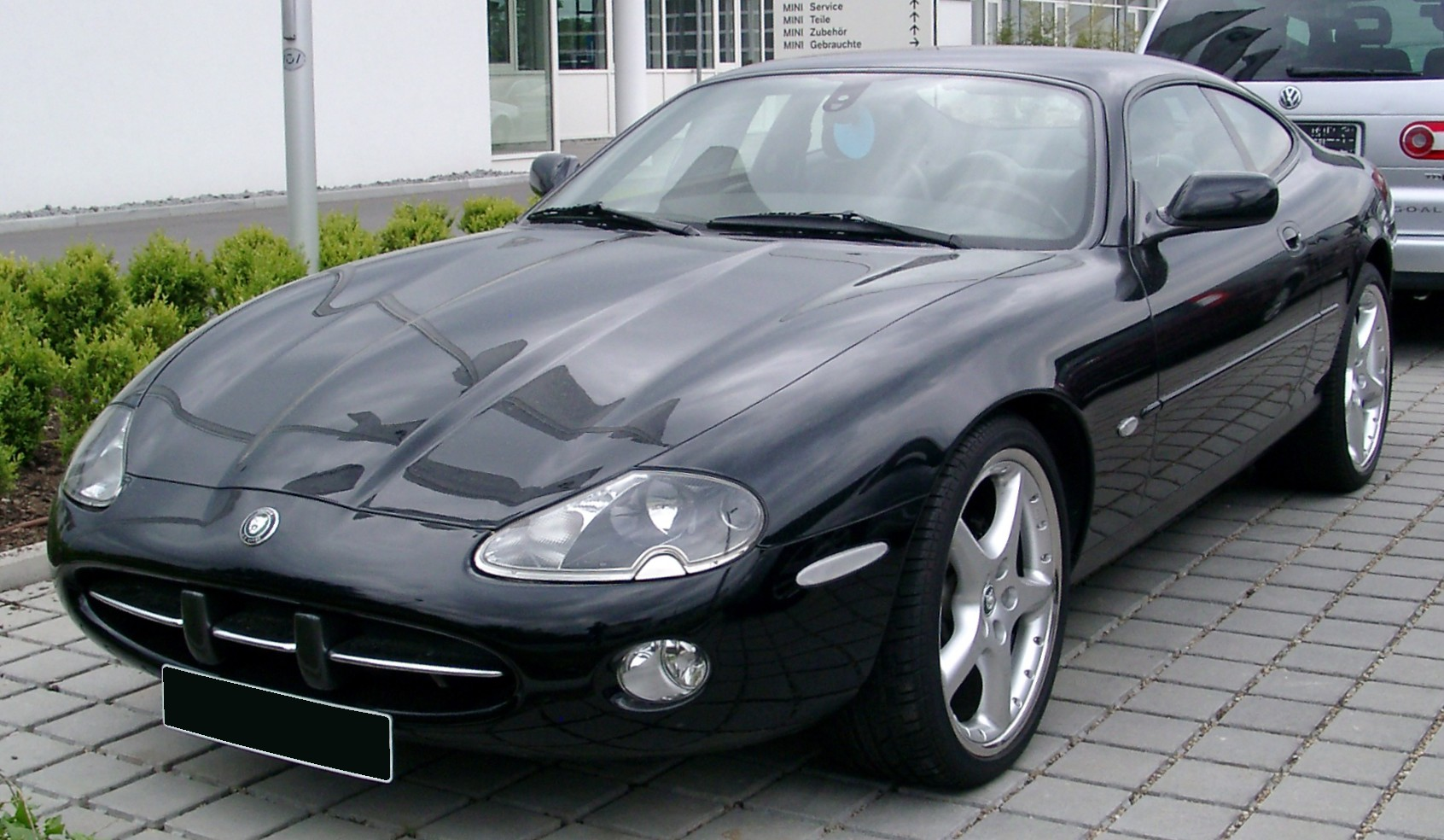 Jaguar X100 (XK8)